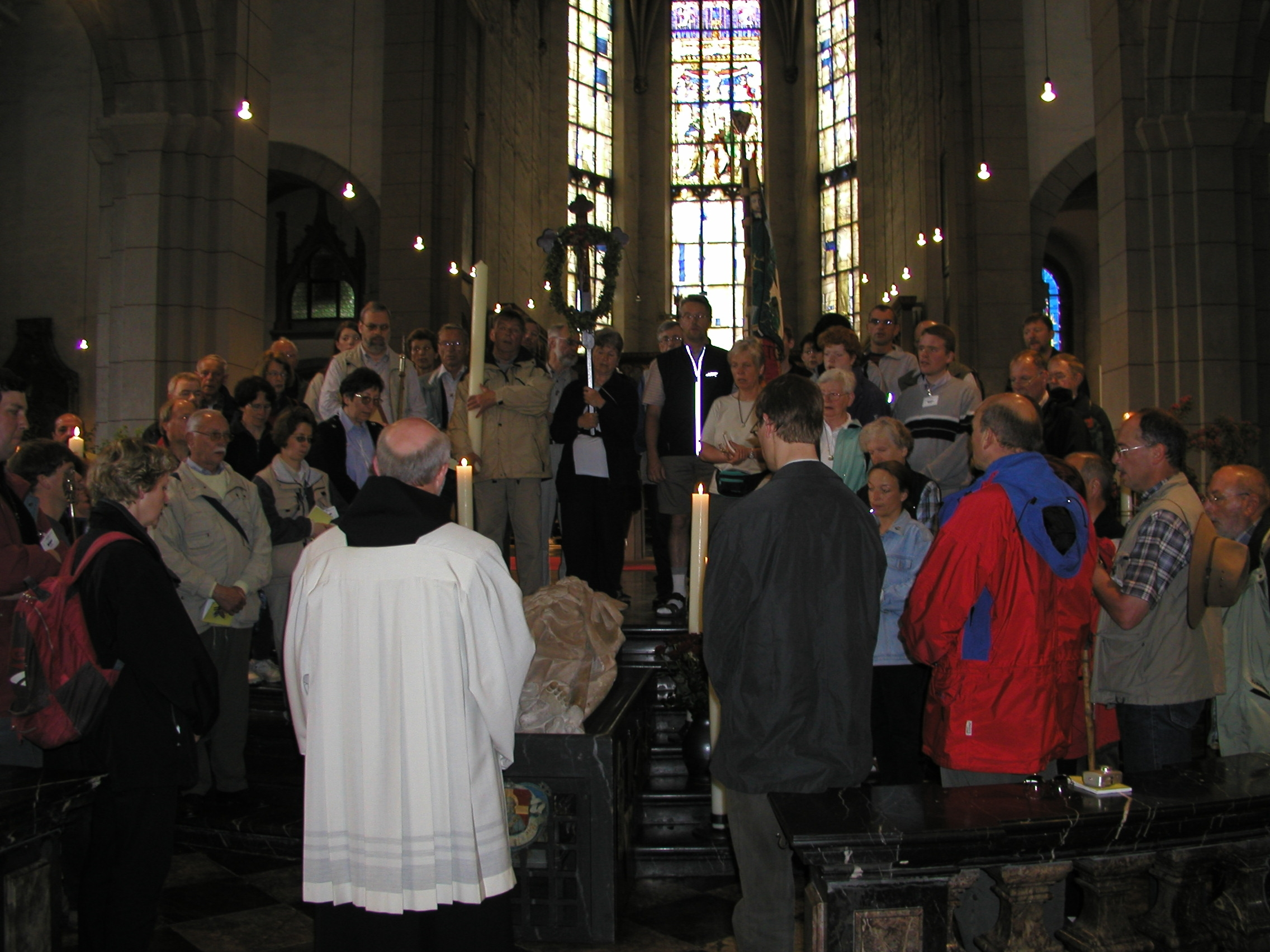 Empfang einer Pilgergruppe der St. Matthias Bruderschaft Büttgen am Grab des Apostels Matthias in der St. Matthias Basilika, Trier